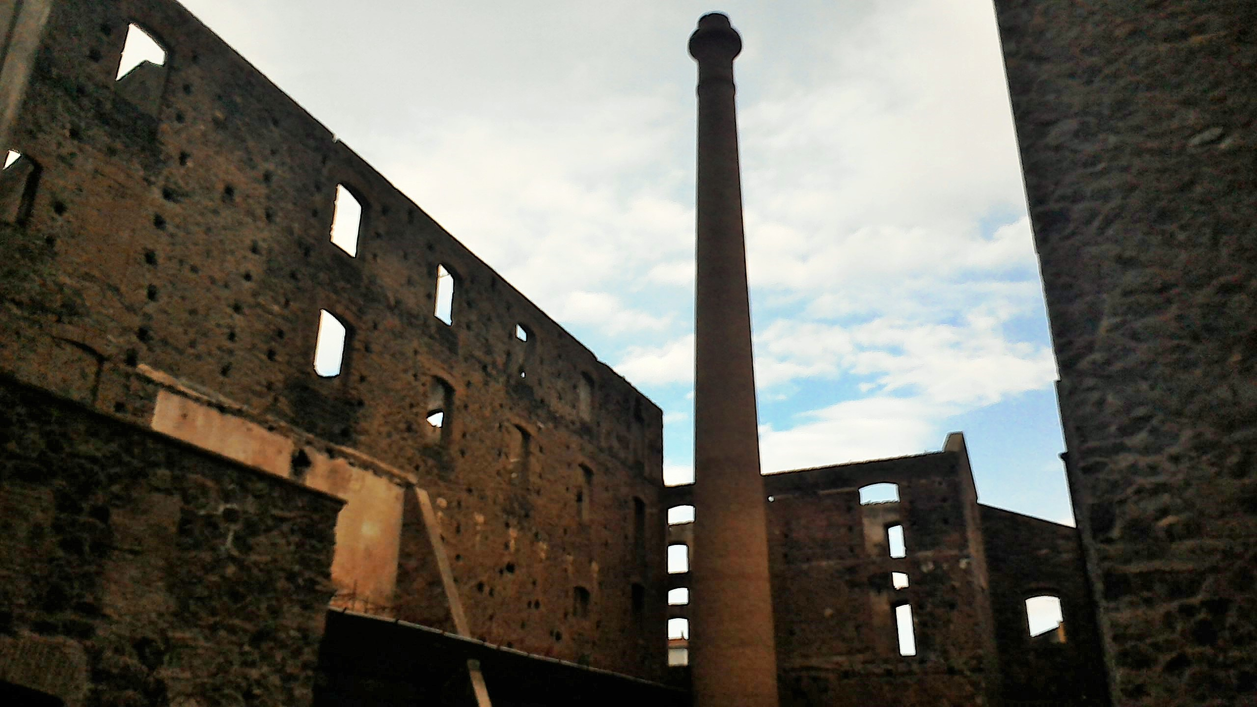 Ciminiera dello stabilimento di Monaco - Misterbianco